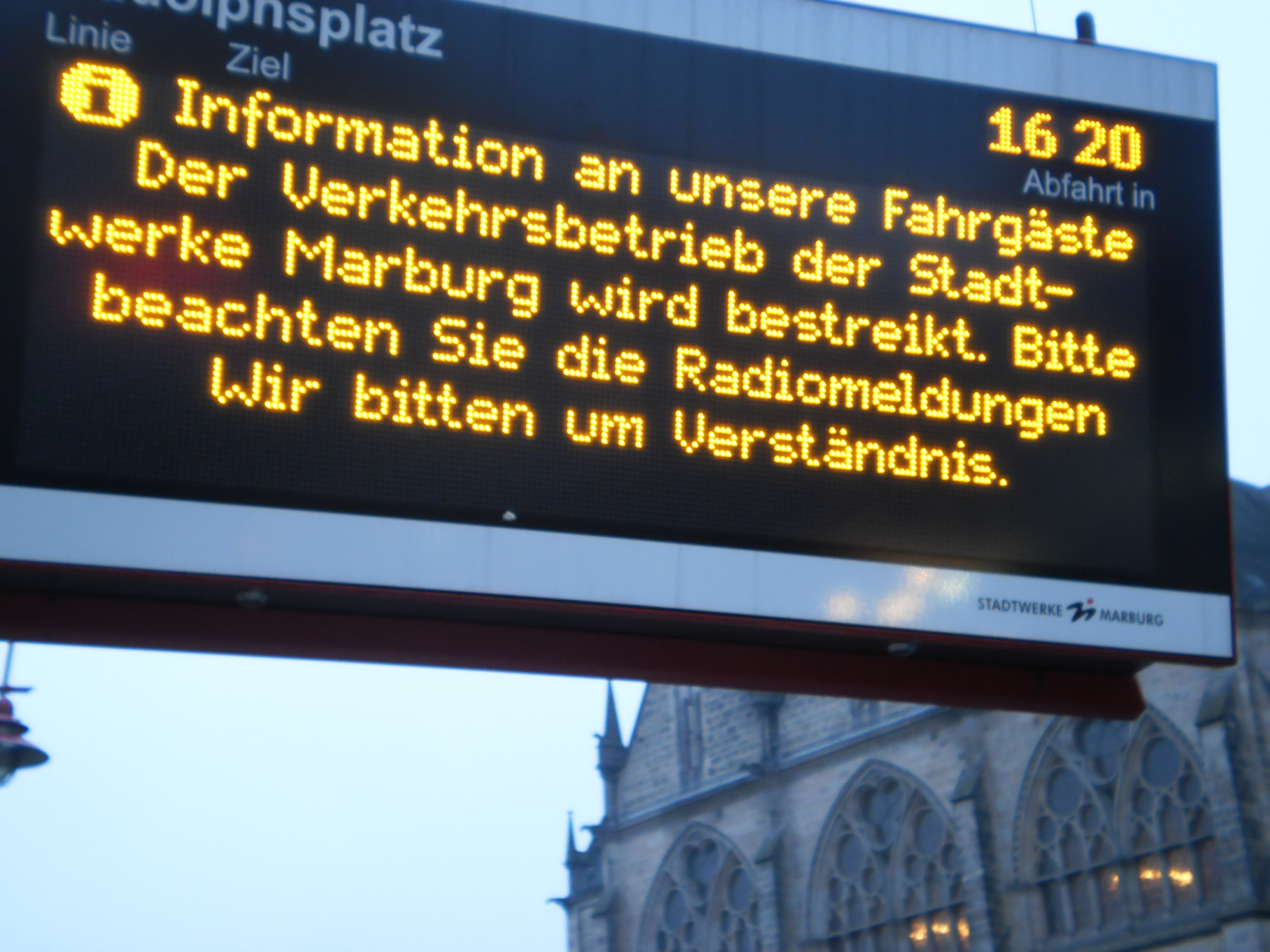 Fahrgastinformation zum Busfahrer-Streik mit Information für die Fahrgäste der Verkehrsbetriebe der Stadtwerke Marburg an der Bushaltestelle Rudolphsplatz und der Bitte um Verständnis. Etwas trüb und schon etwas düster am Nachmittag (2017-01-09) mit der Alten Universität in Marburg hinter dem LED-Display.